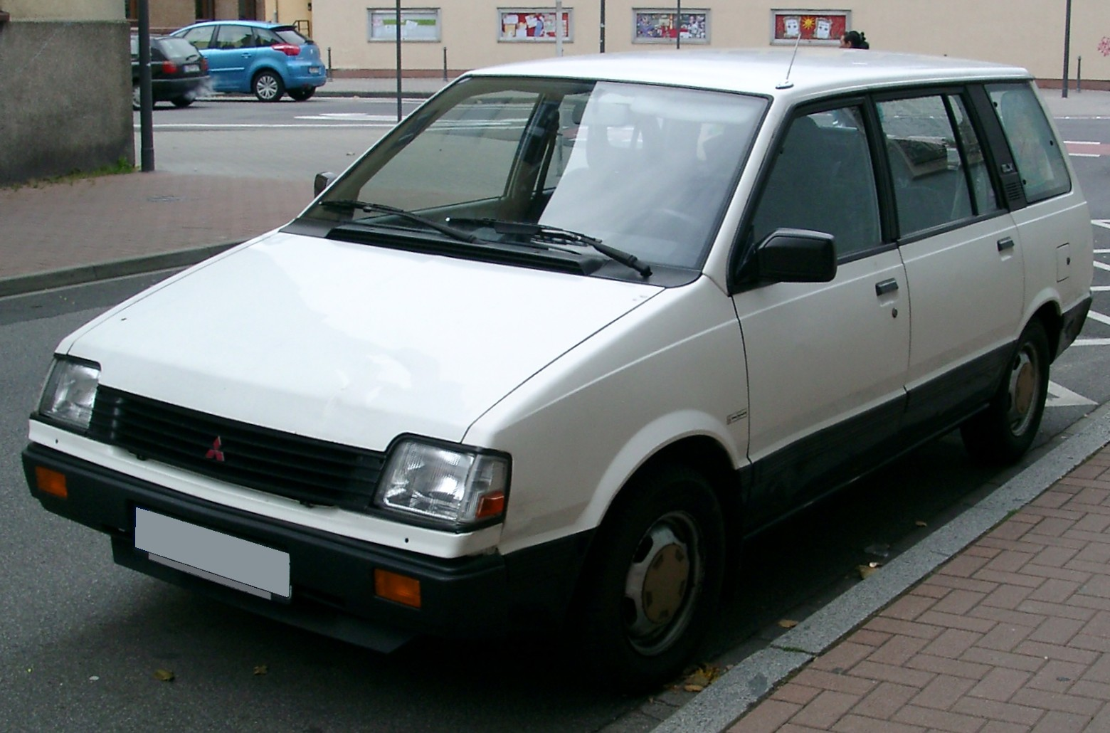 Mitsubishi Space Wagon, 1. Generation